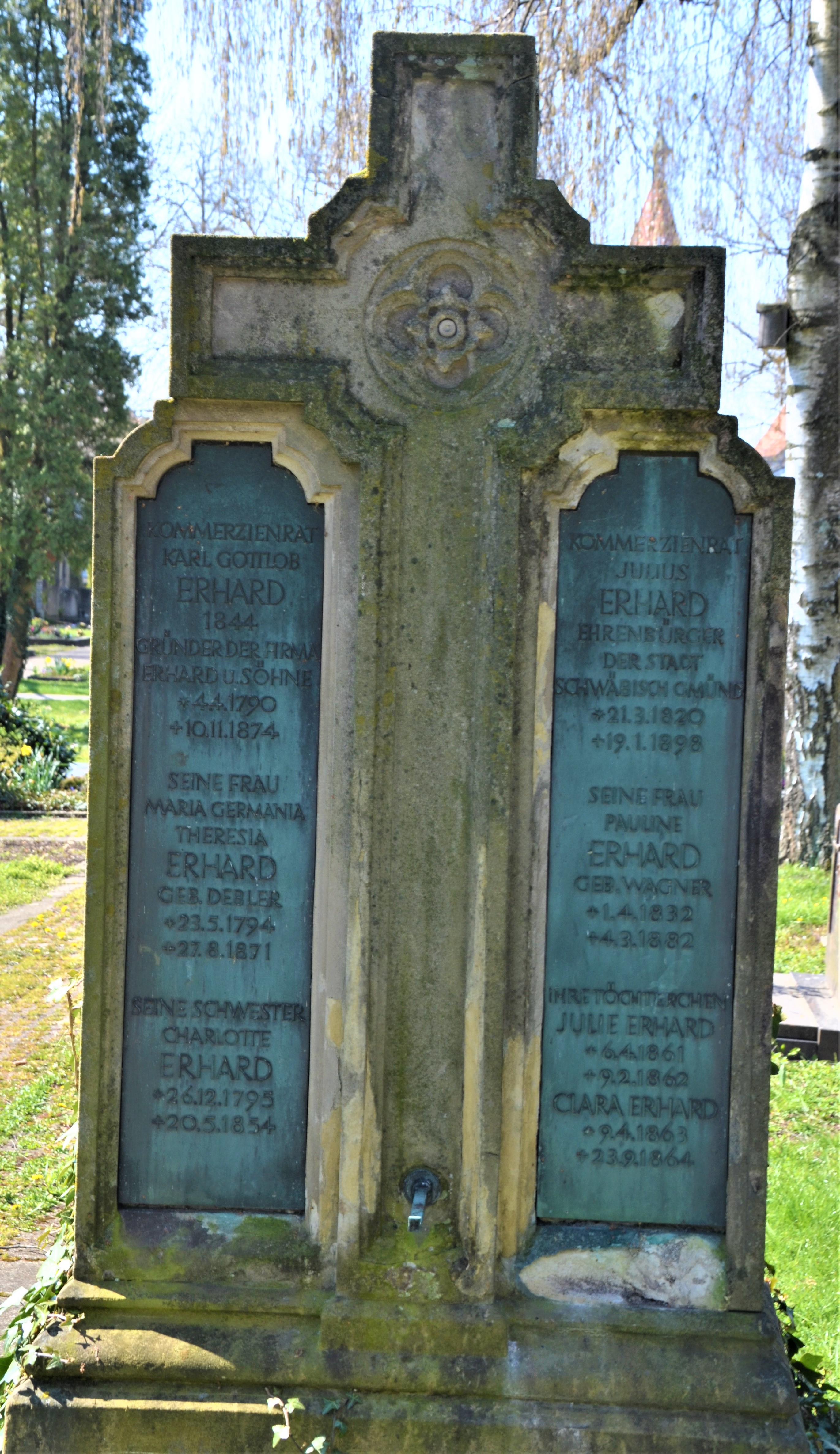 Linke Platte des Familiengrabs der Fabrikantenfamilie Erhard auf dem Leonhardsfriedhof Schwäbisch Gmünd